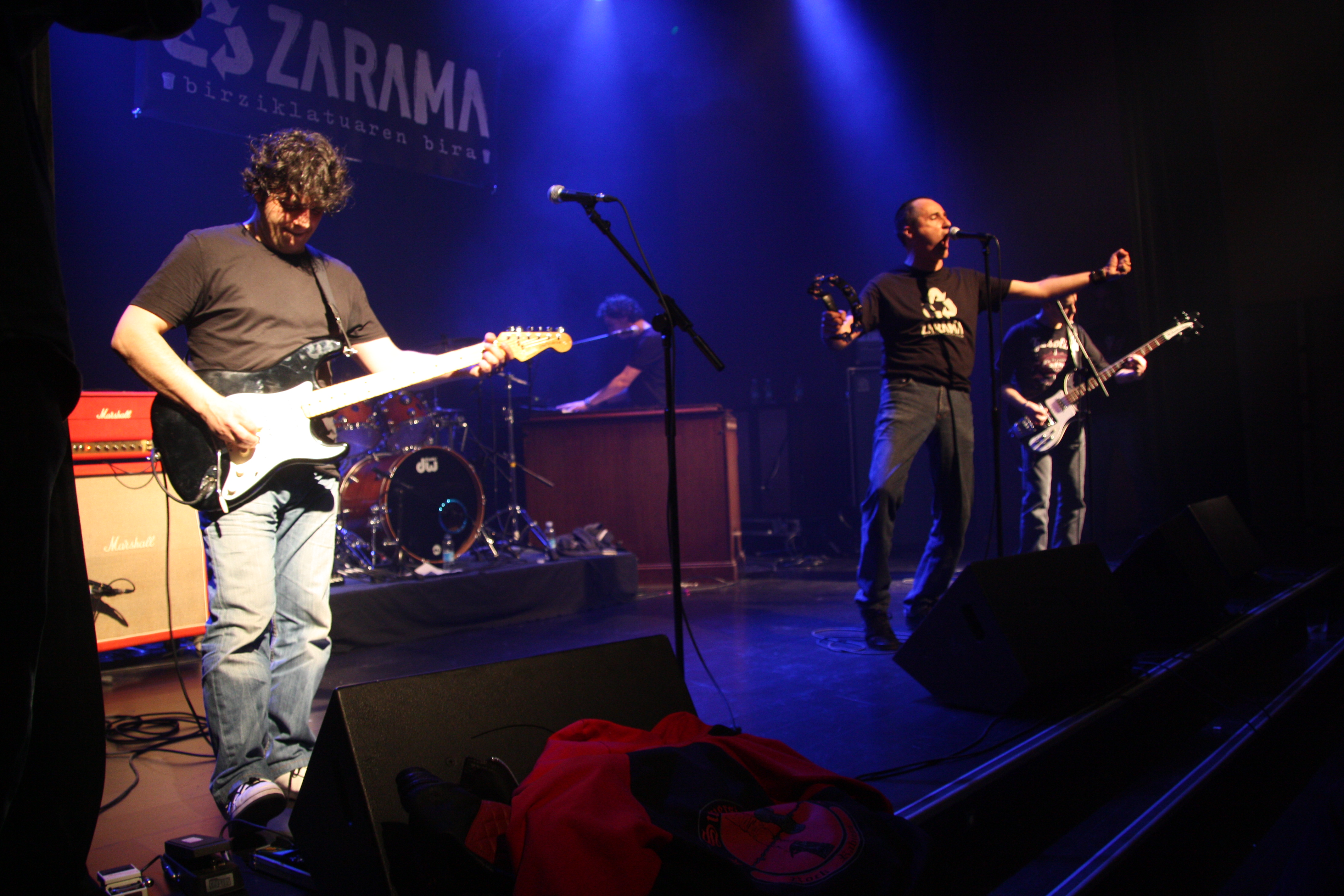 Zarama taldearen itzuleran Bermion emandako kontzertua.